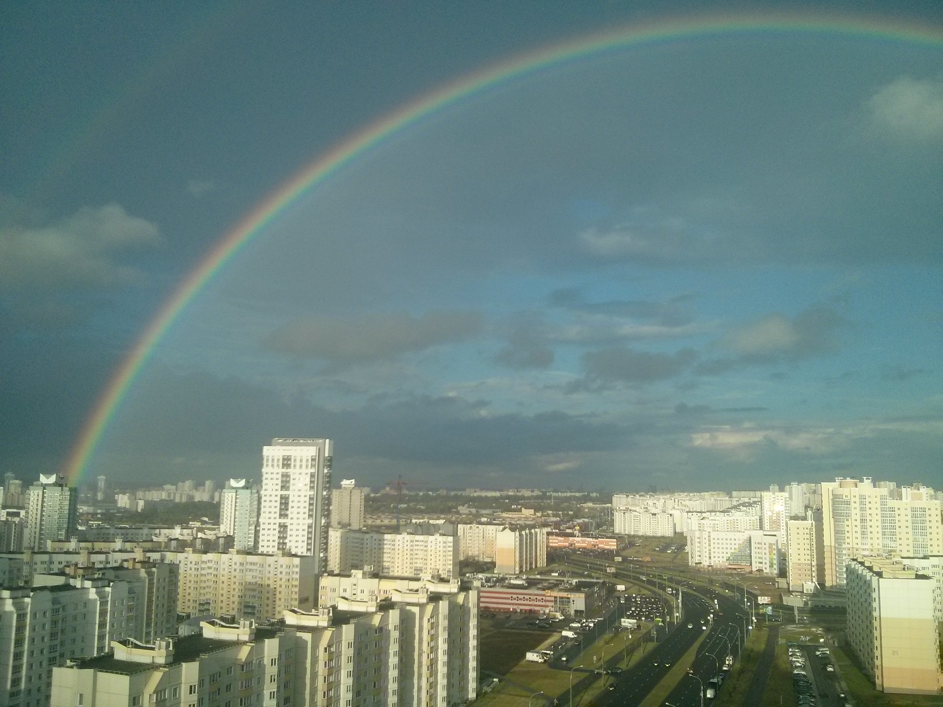 Каменная горка з вышынi